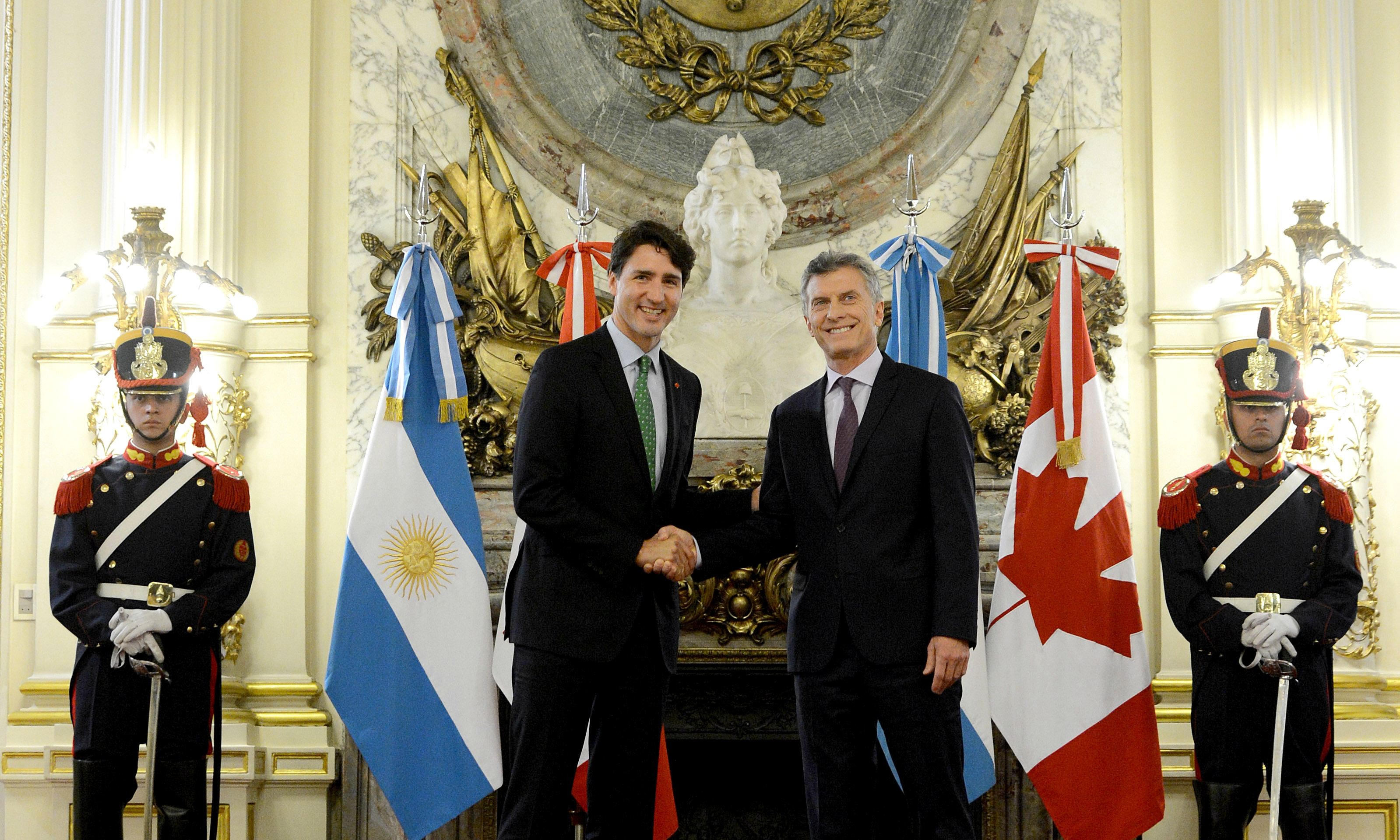 El presidente Mauricio Macri recibió al primer ministro de Canadá, Justin Trudeau, con quien acordó que ambos países establezcan una alianza a largo plazo para avanzar en estrategias que fomenten las inversiones, el comercio y el empleo y que ayuden a mejorar las políticas implementadas sobre gobierno abierto, cuidado del medio ambiente, educación y seguridad, entre otros objetivos comunes.